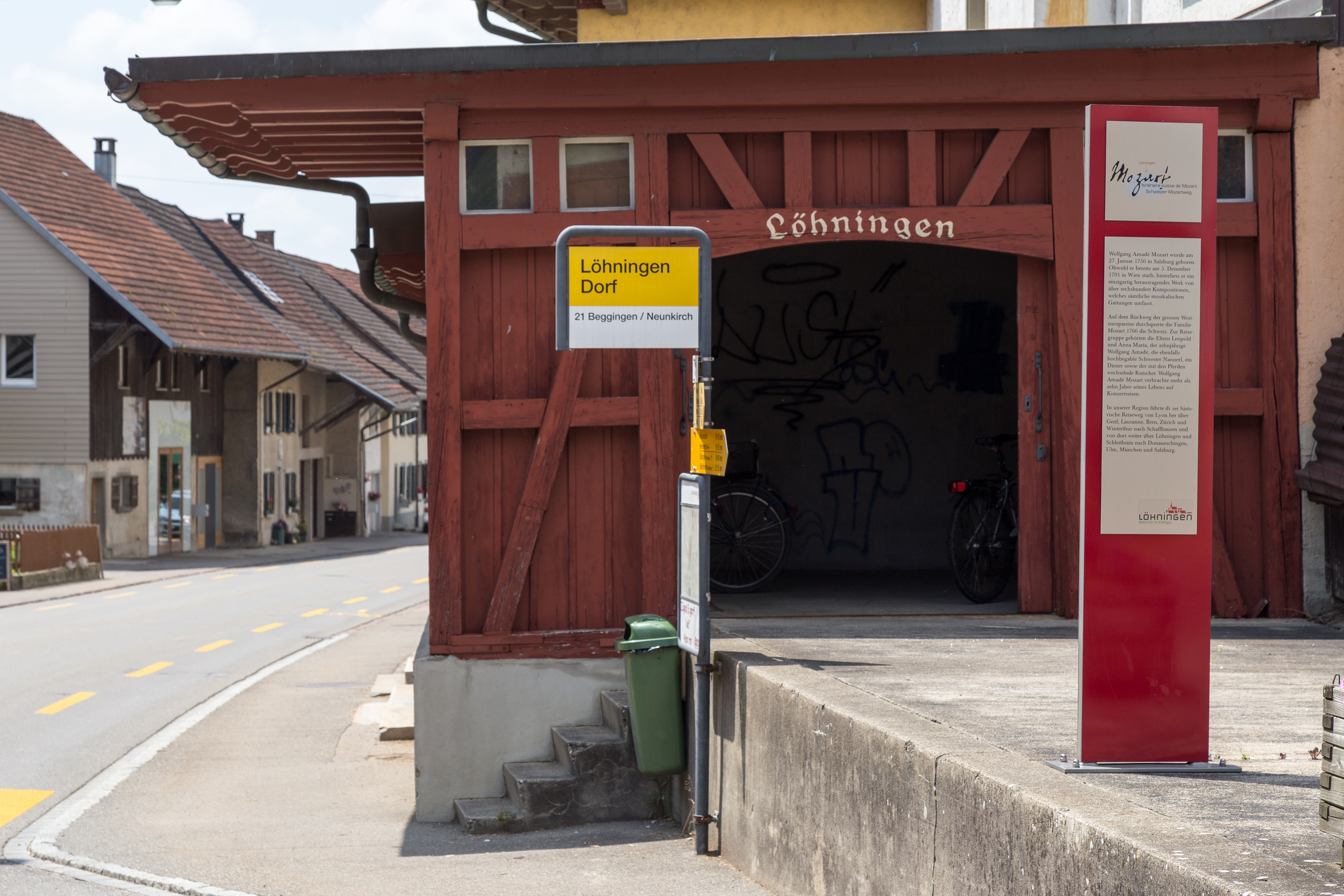 Postauto-Haltestelle Löhningen Dorf beim ehemaligen Tram-Stationsgebäude und am Mozartweg.